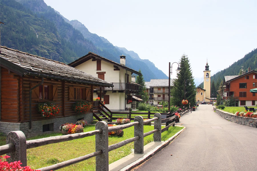 Veduta di Gressoney-La-Trinité